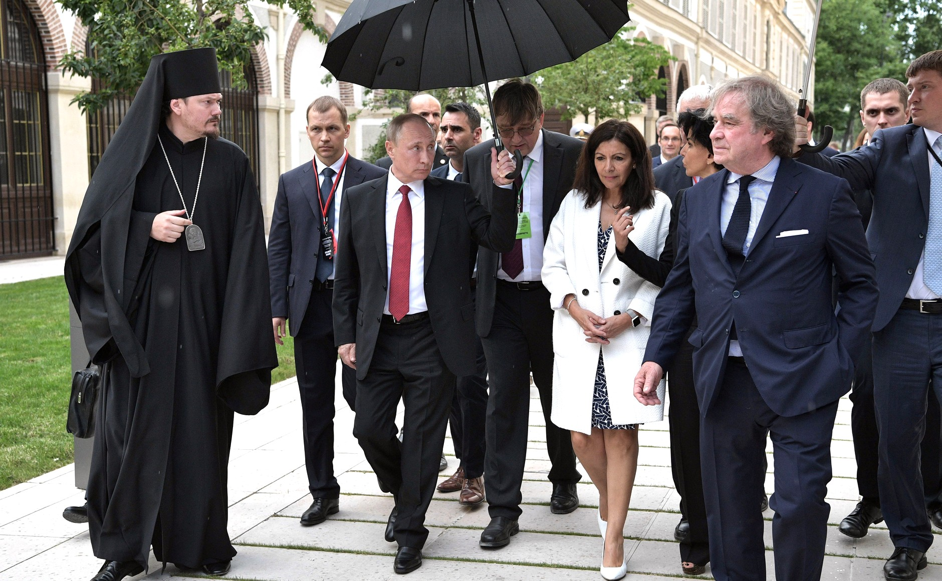 Президент России Владимир Путин во время посещения Российского духовно-культурного центра в Париже.